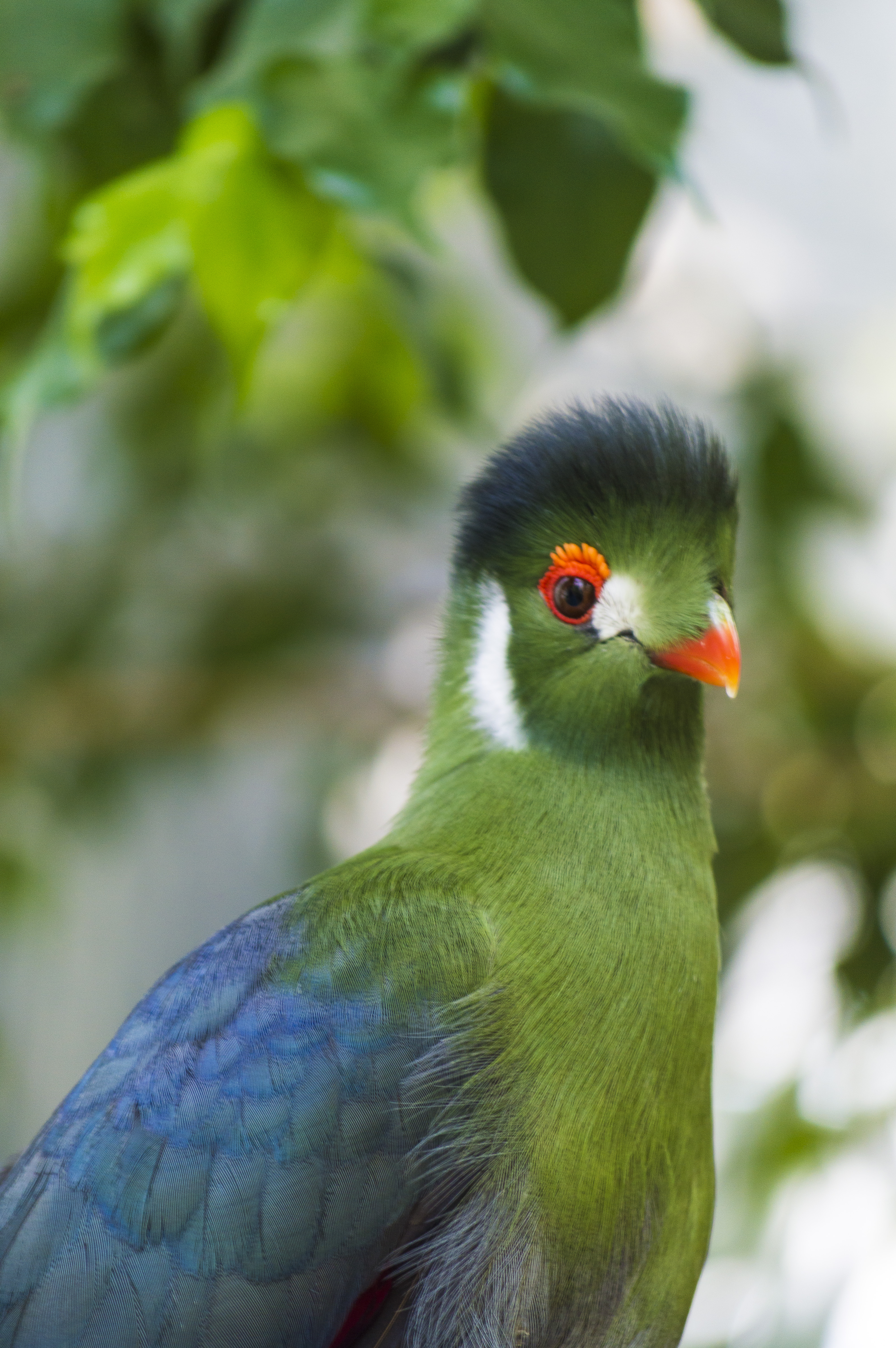 Tauraco leucotis au parc Phoenix de Nice.